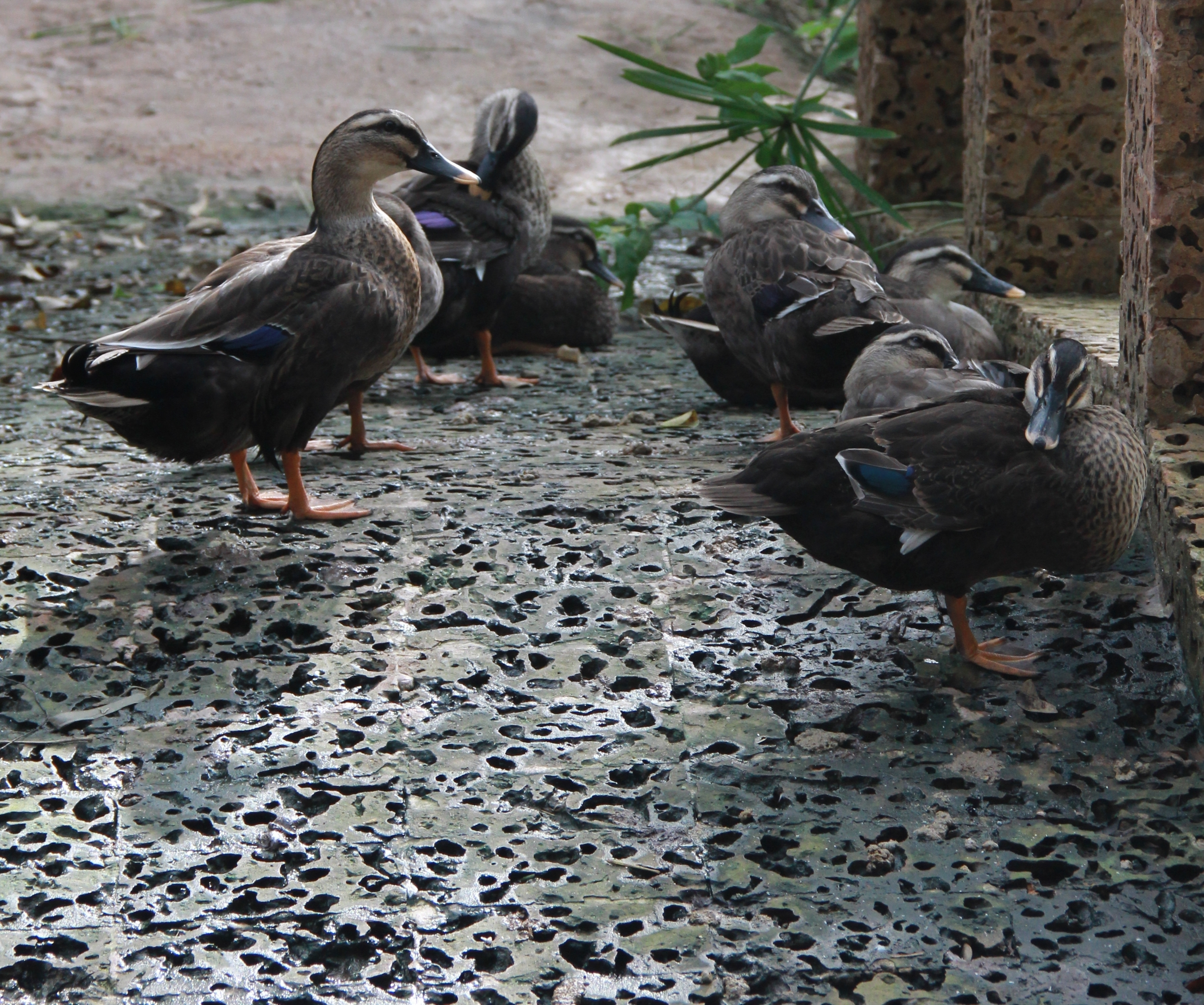 Hình chụp về một đàn vịt cỏ tại huyện Củ Chi